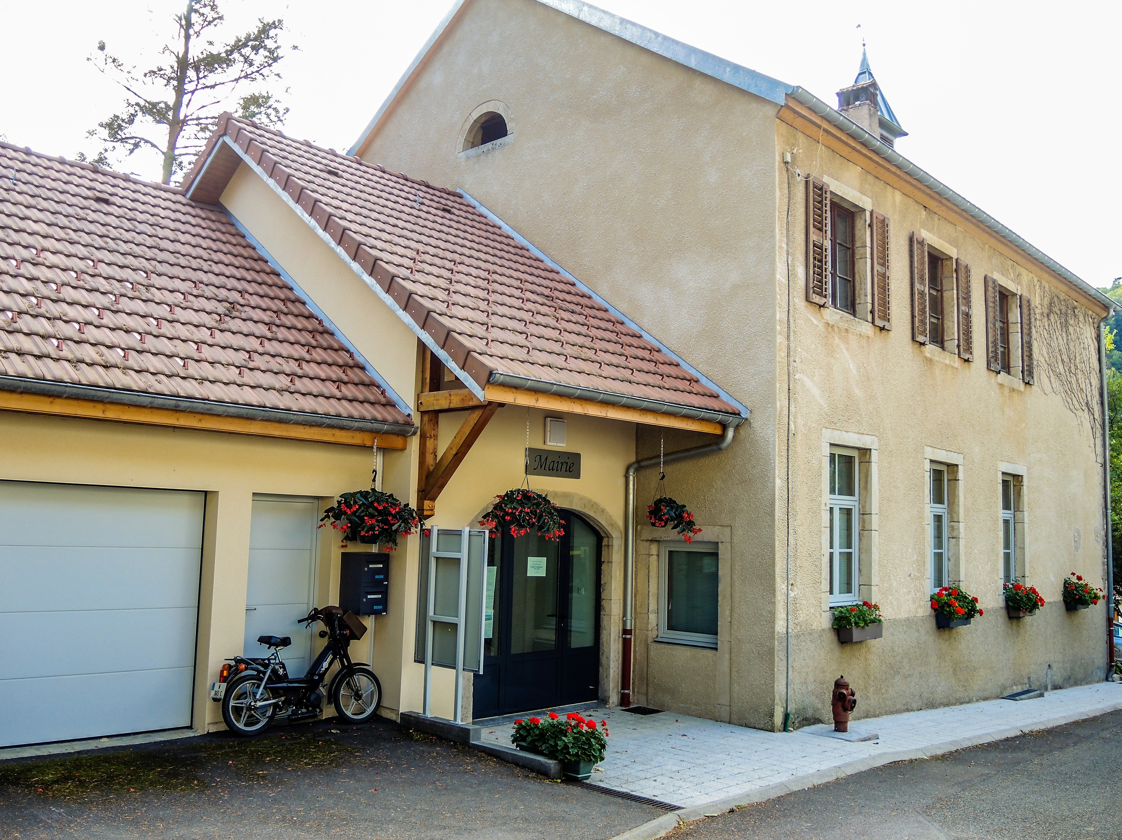 Mairie de Liebvillers. Doubs